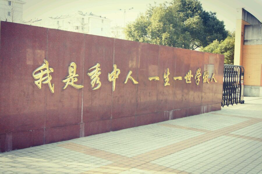 秀州中学の校訓